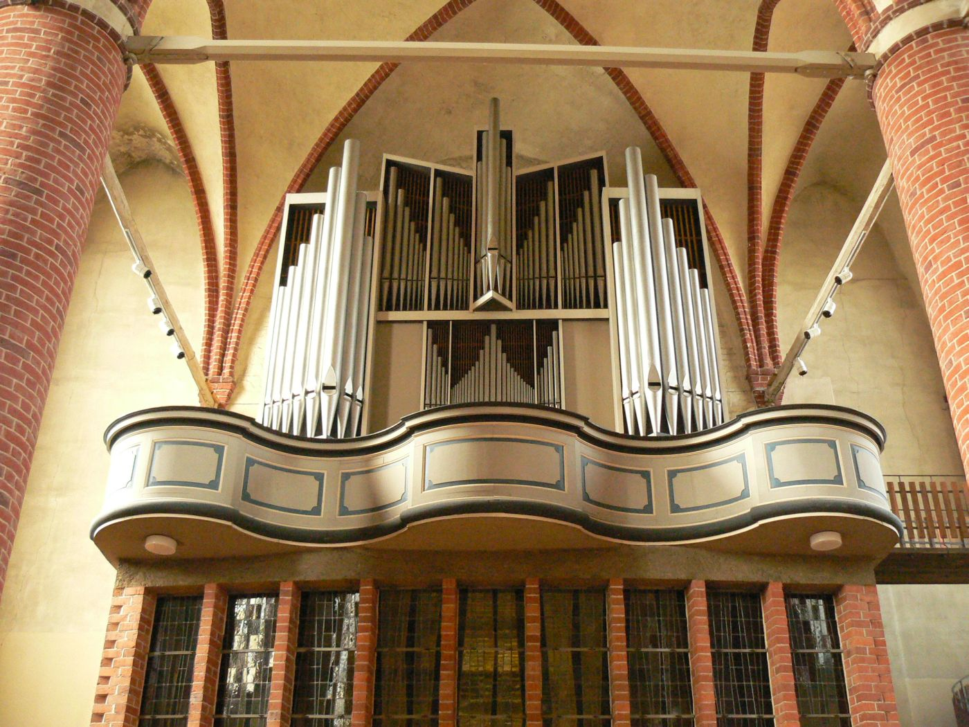 Greifswald, St Jacobi, Schuke-Orgel (1968)